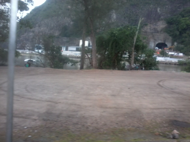 Local onde ocorrem as escavações da linha 4 do Metrô do Rio de Janeiro. O túnel do qual sairá uma ponte em direção à estação Jardim Oceânico é visível no fundo